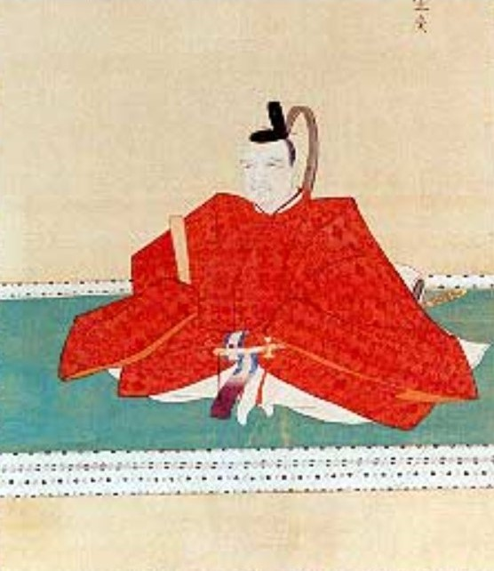 溝口重雄の肖像。